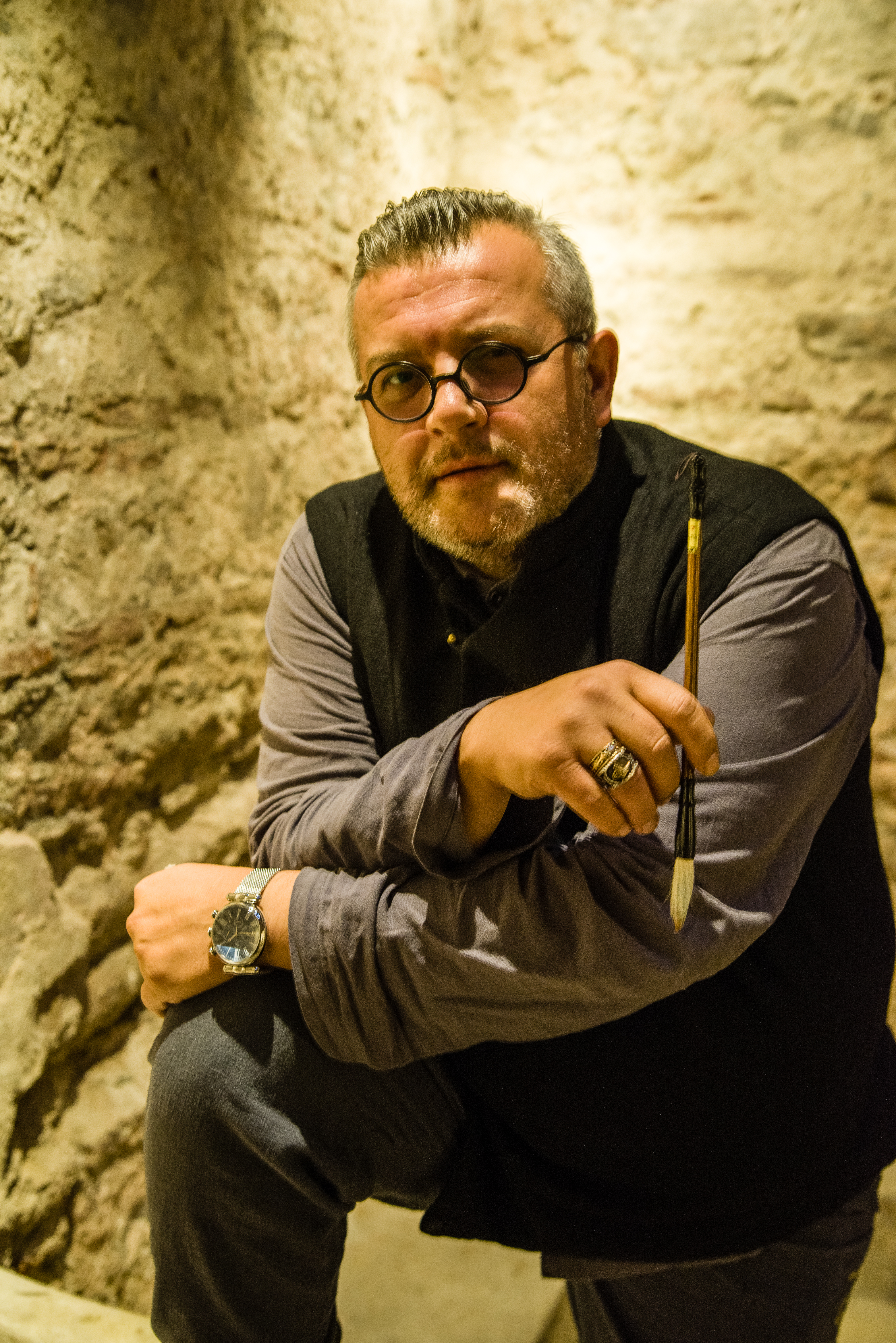 Portret i Fahredin Shehut